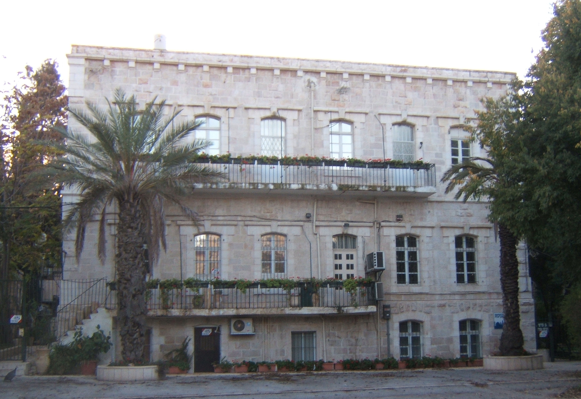 Taytu Betul House, Adler Street, Jerusalem